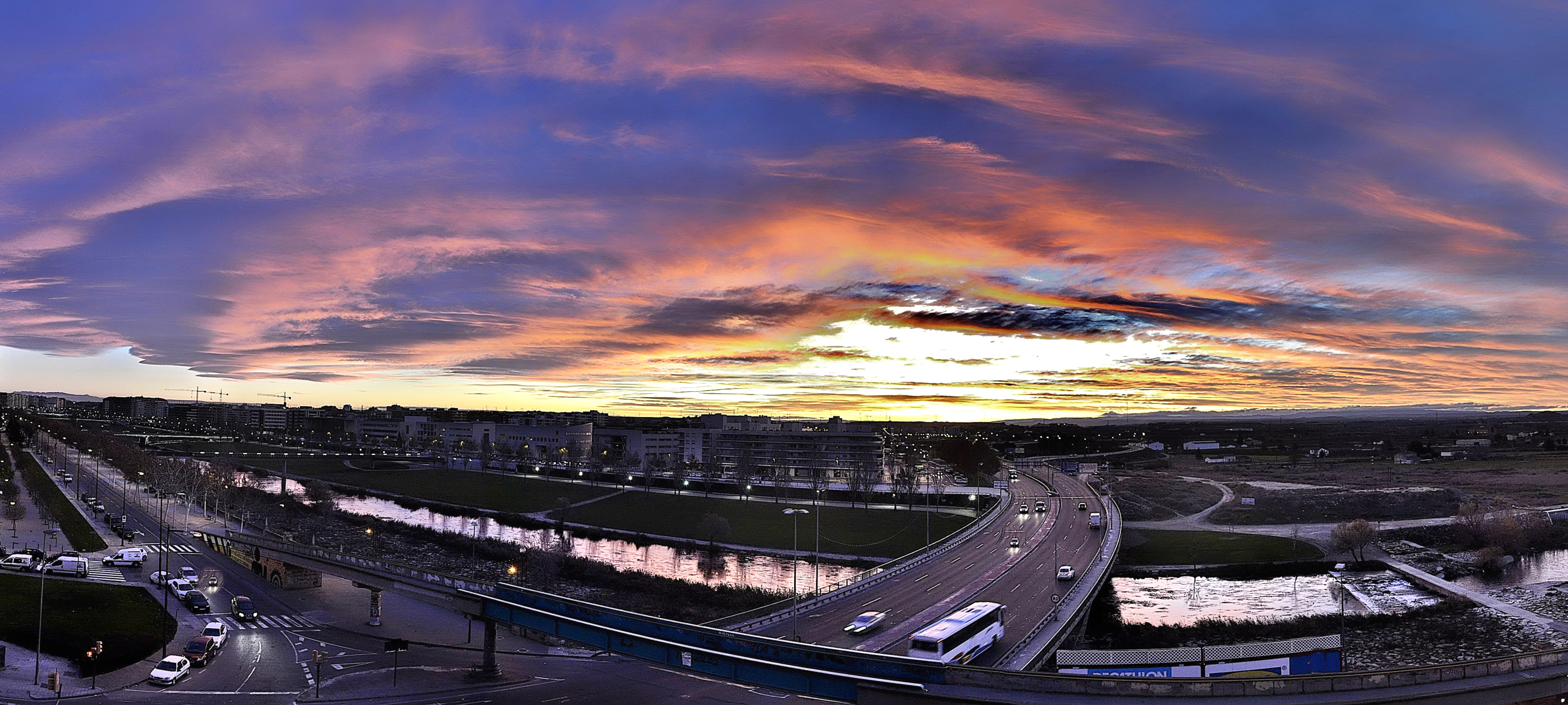 Puente Nuevo sobre el rio Segre.